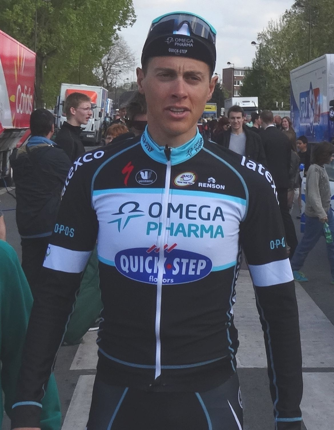 Retour des cyclistes à leurs bus après l'arrivée du Paris-Roubaix 2014 et pendant la remise des prix, le 13 avril 2014, à Roubaix, Nord, Nord-Pas-de-Calais, France. Depicted person: Niki Terpstra